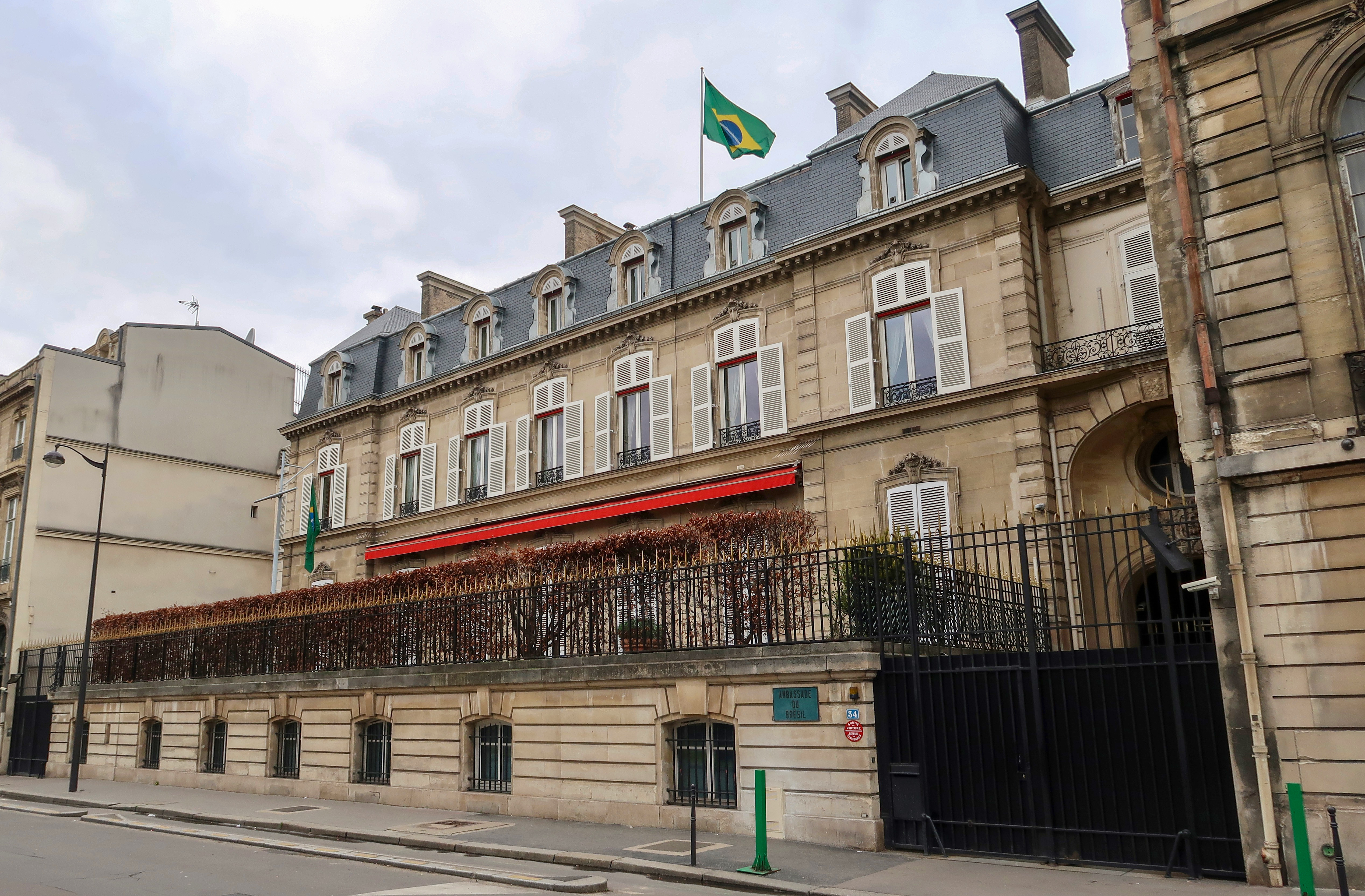 Ambassade du Brésil en France, 34 cours Albert-Ier (Paris, 8e).